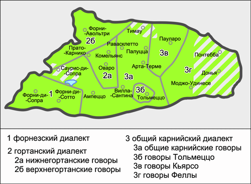 Карта диалектов и говоров карнийской диалектной группы фриульского языка. Источники: Roseano P. Suddivisione dialettale del friulano // S. Heinemann, L. Melchior (eds.). Manuale di linguistica friulana. — Berlin: De Gruyter Mouton, 2015. — P. 162—163. — ISBN 978-3-11-031059-7. Treccani. Enciclopedia. Friulani, dialetti (2010). Нарумов Б. П., Сухачёв Н. Л. Фриульский язык // Языки мира. Романские языки. — М.: Academia, 2001. — С. 366—367. — ISBN 5-87444-016-Х